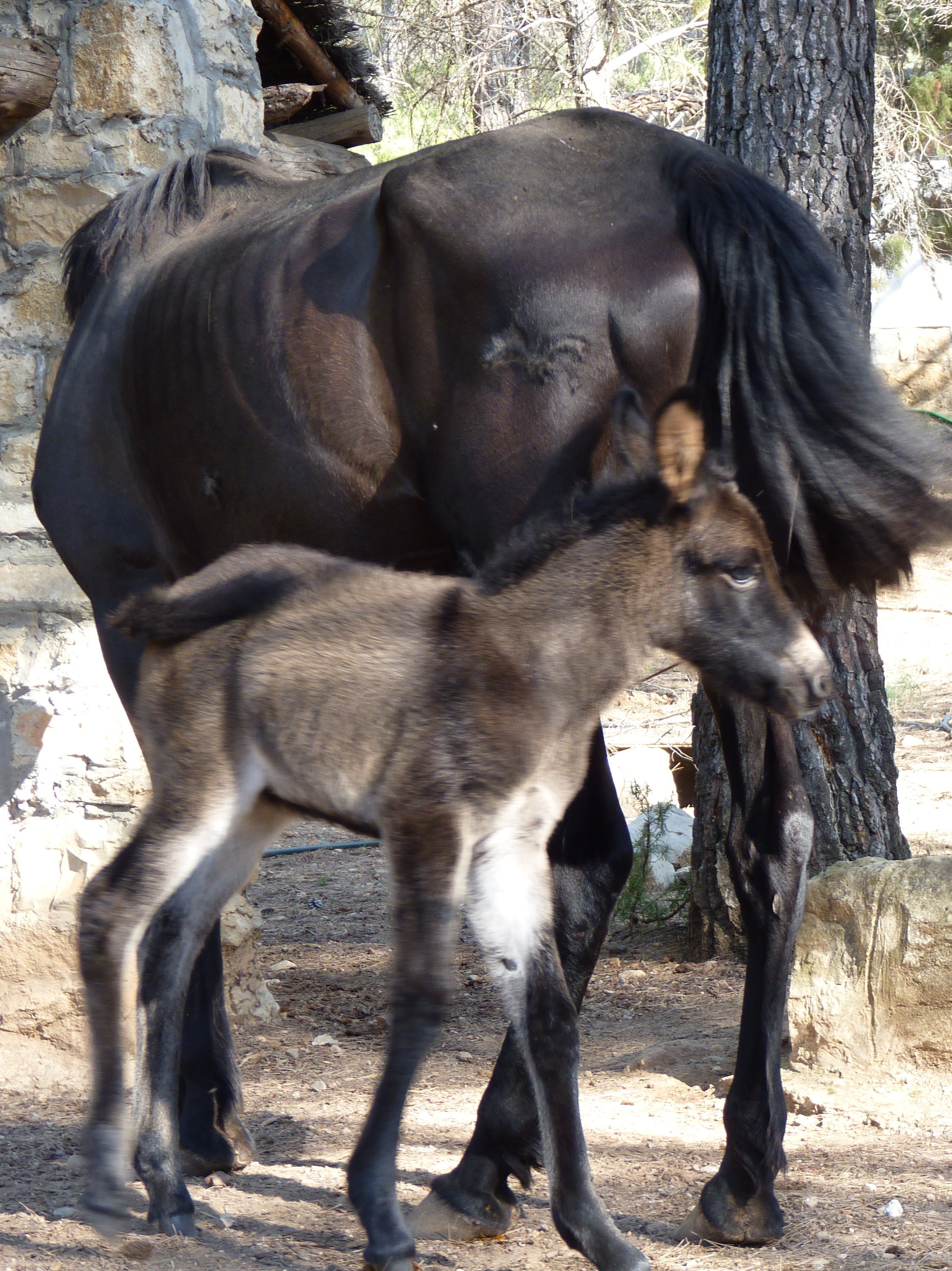 De un burrito descartado de mercados medievales por mayor y cojo ... y de una yegua abandonada por sus antiguos dueños, hemos tenido una nueva habitante en Benageber